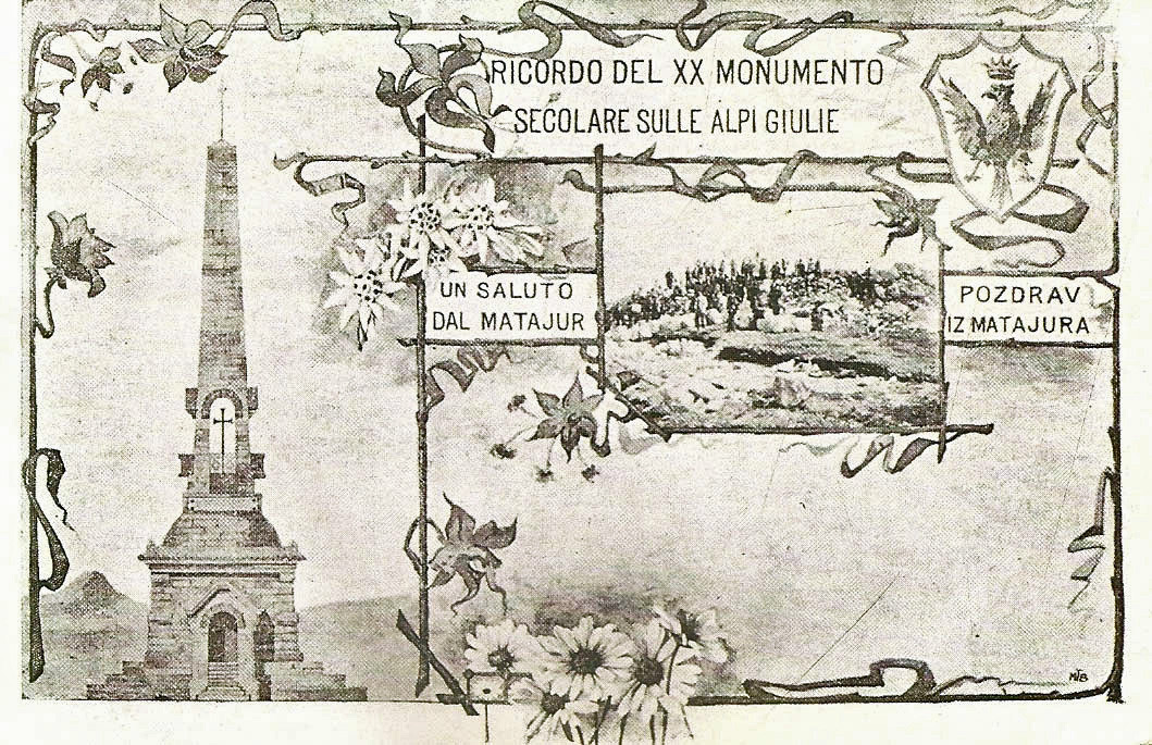 Razglednica Matajura.